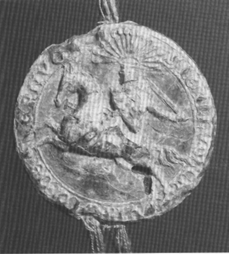 Reiterwappen des Konrad von Ehrenfels